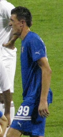 Ivan Krstanović